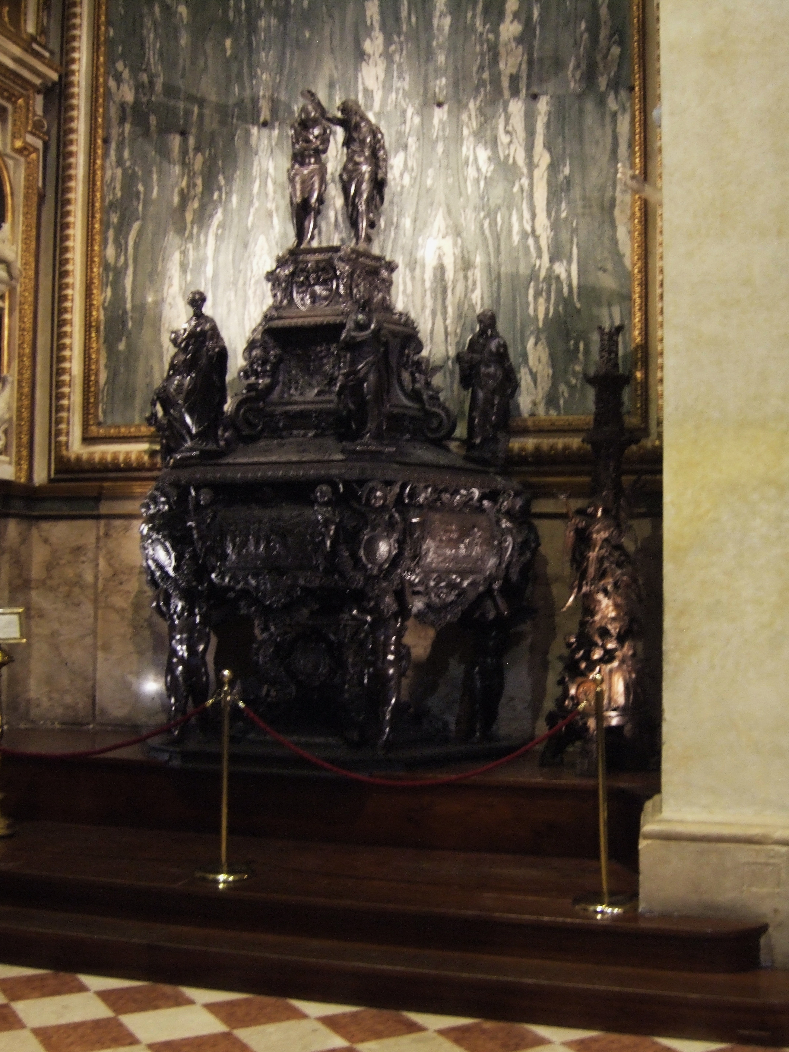 Santuario della Santa Casa (Loreto) Battistero - opera di Tiburzio Vergelli